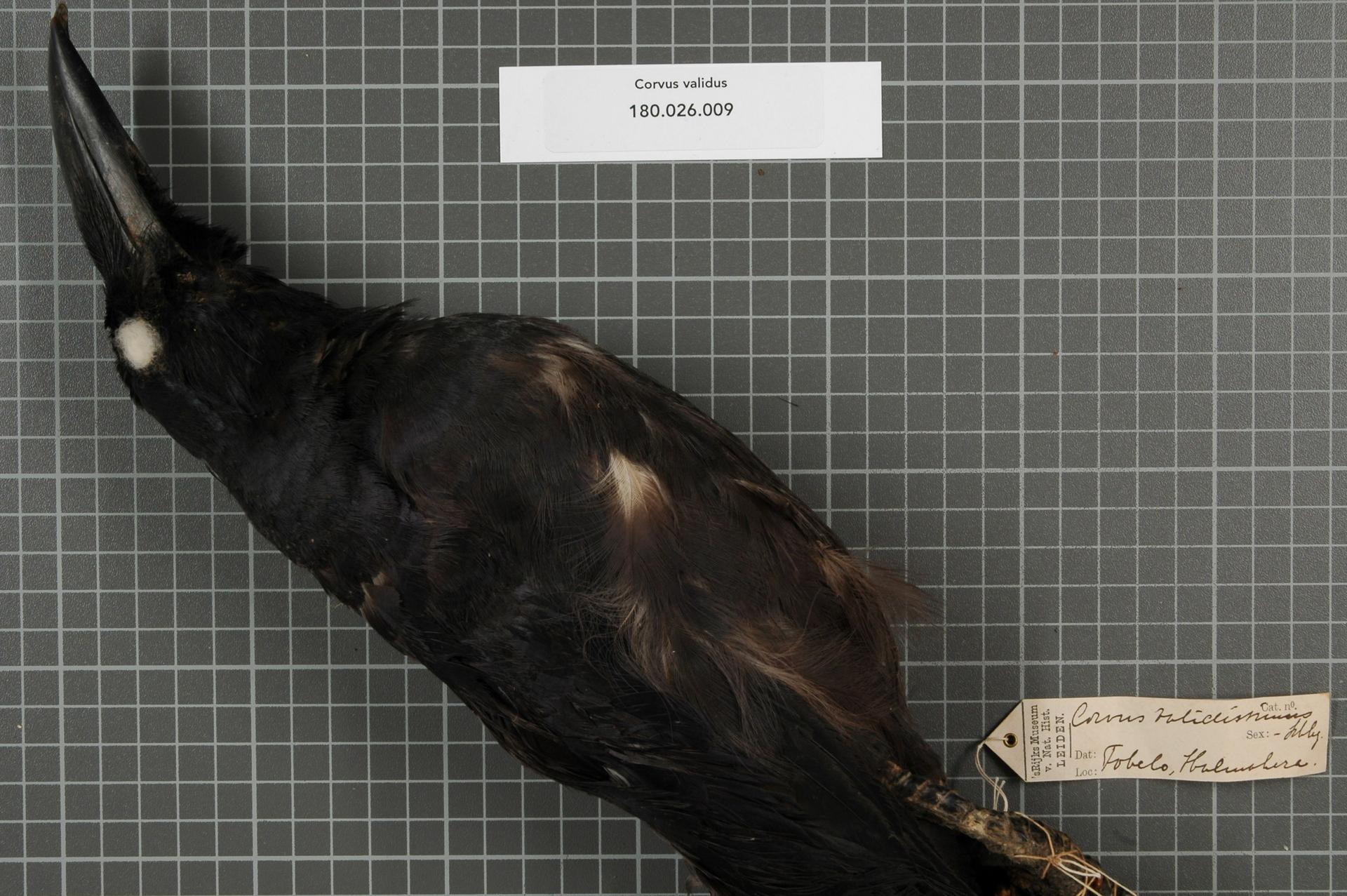 Corvus validus Bonaparte, 1851